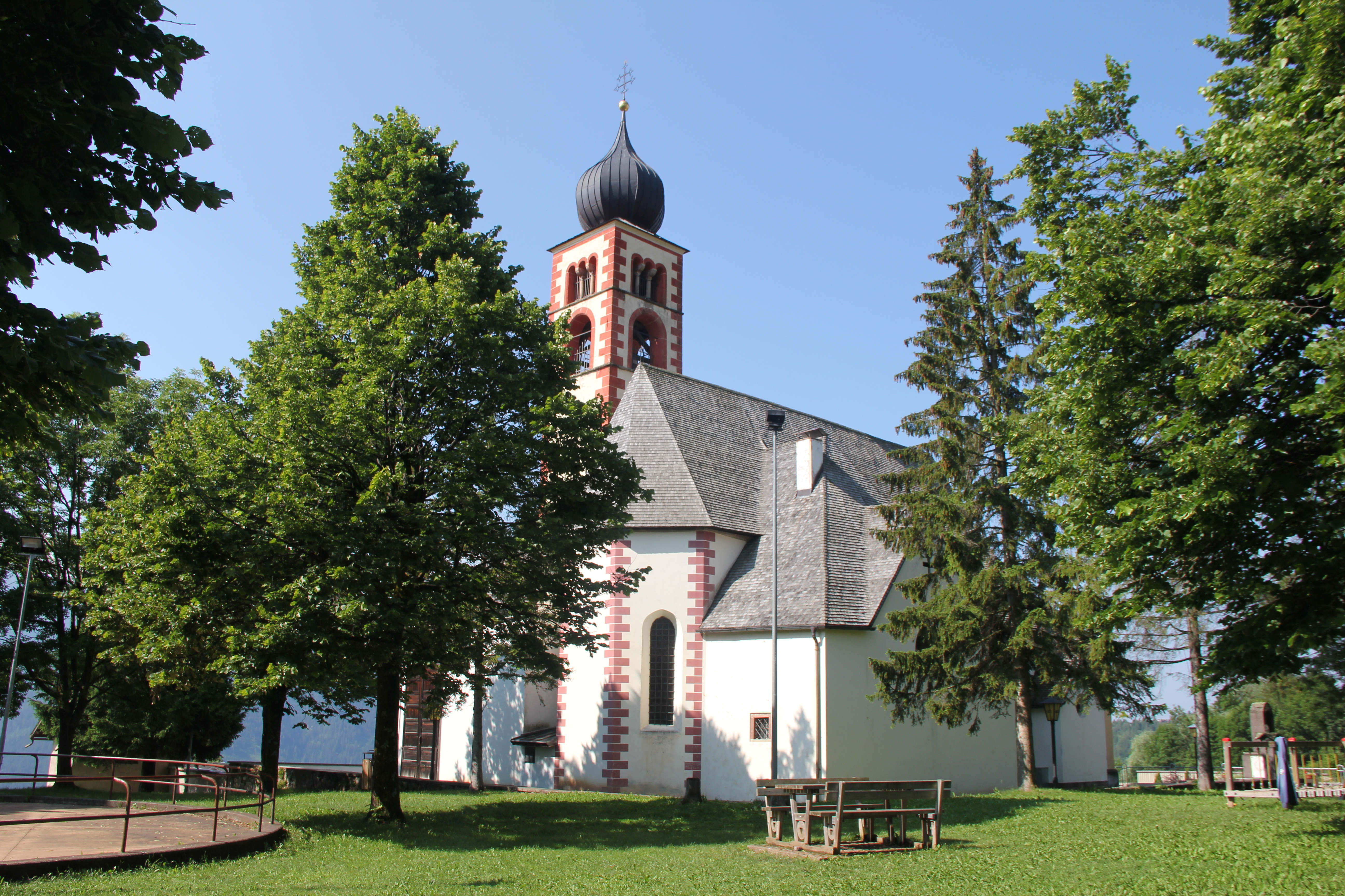 Pfarrkirche von Daiano